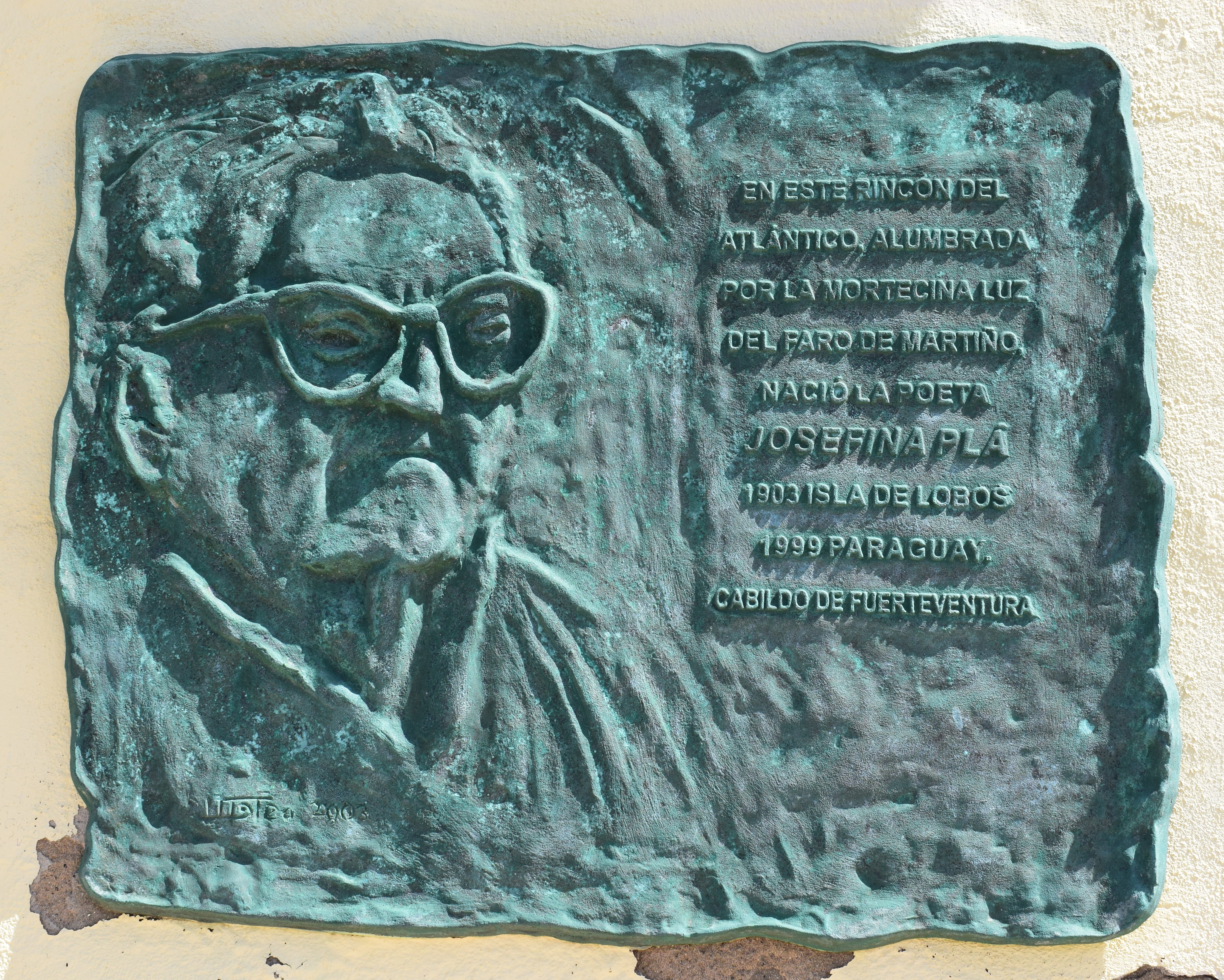 Gedenktafel für die hier geborene Schriftstellerin Josefina Pla am Leuchtturm Faro de Martiño auf der Kanareninsel Lobos.